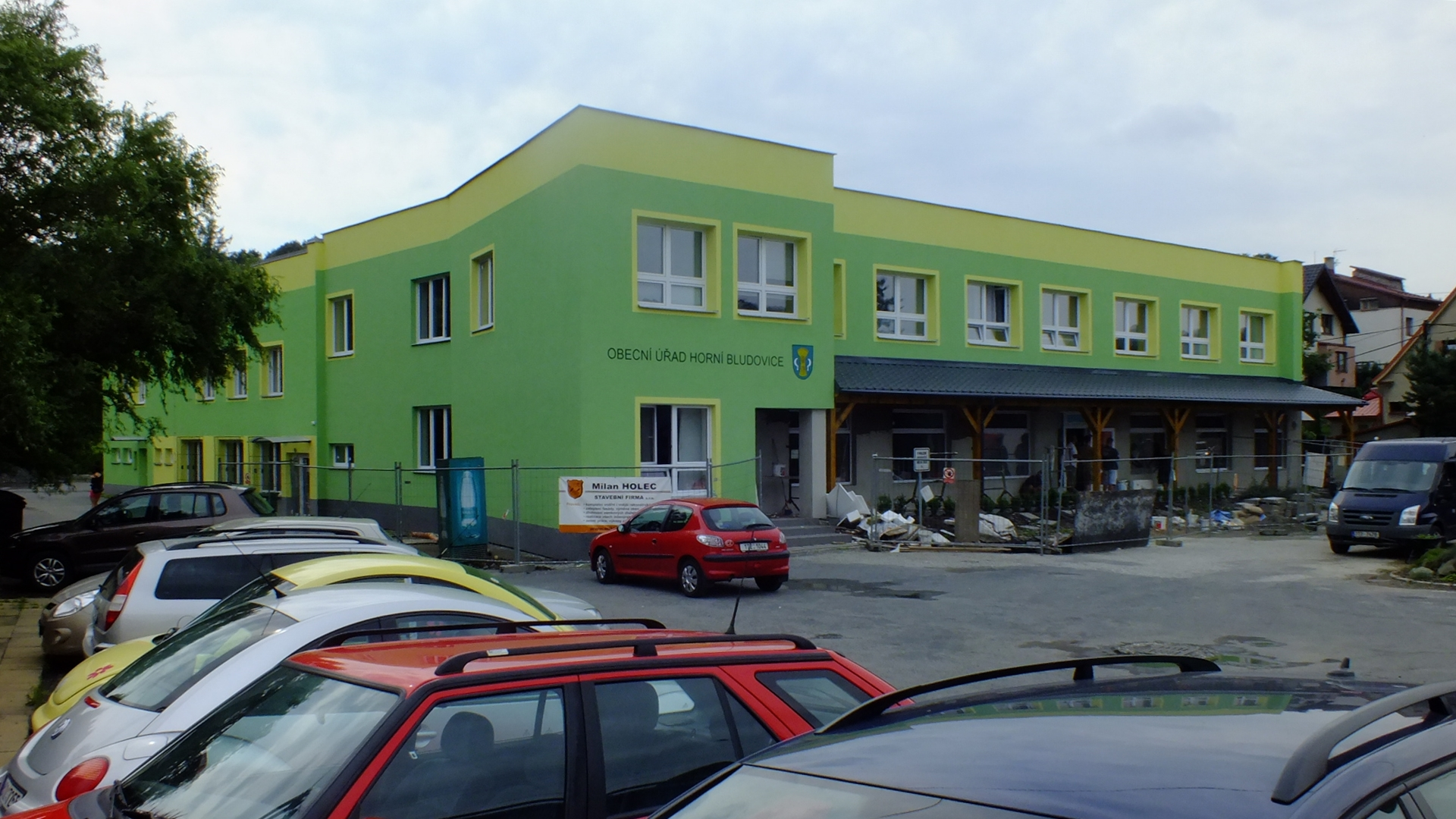 Obecní úřad